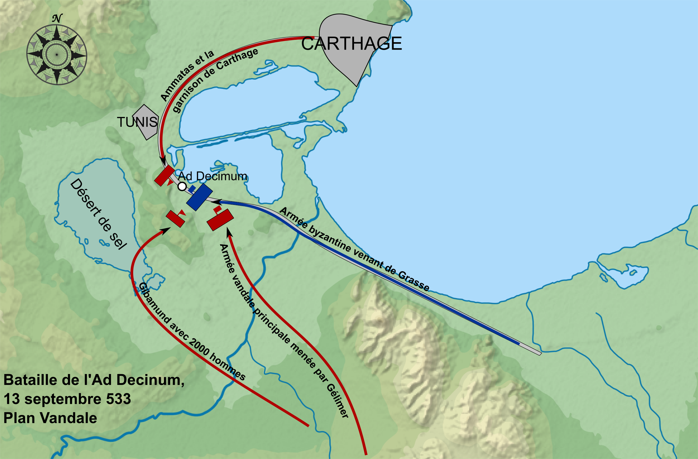 Plan de bataille des Vandales dans la bataille de l'ad Decinum contre l'armée byzantine.